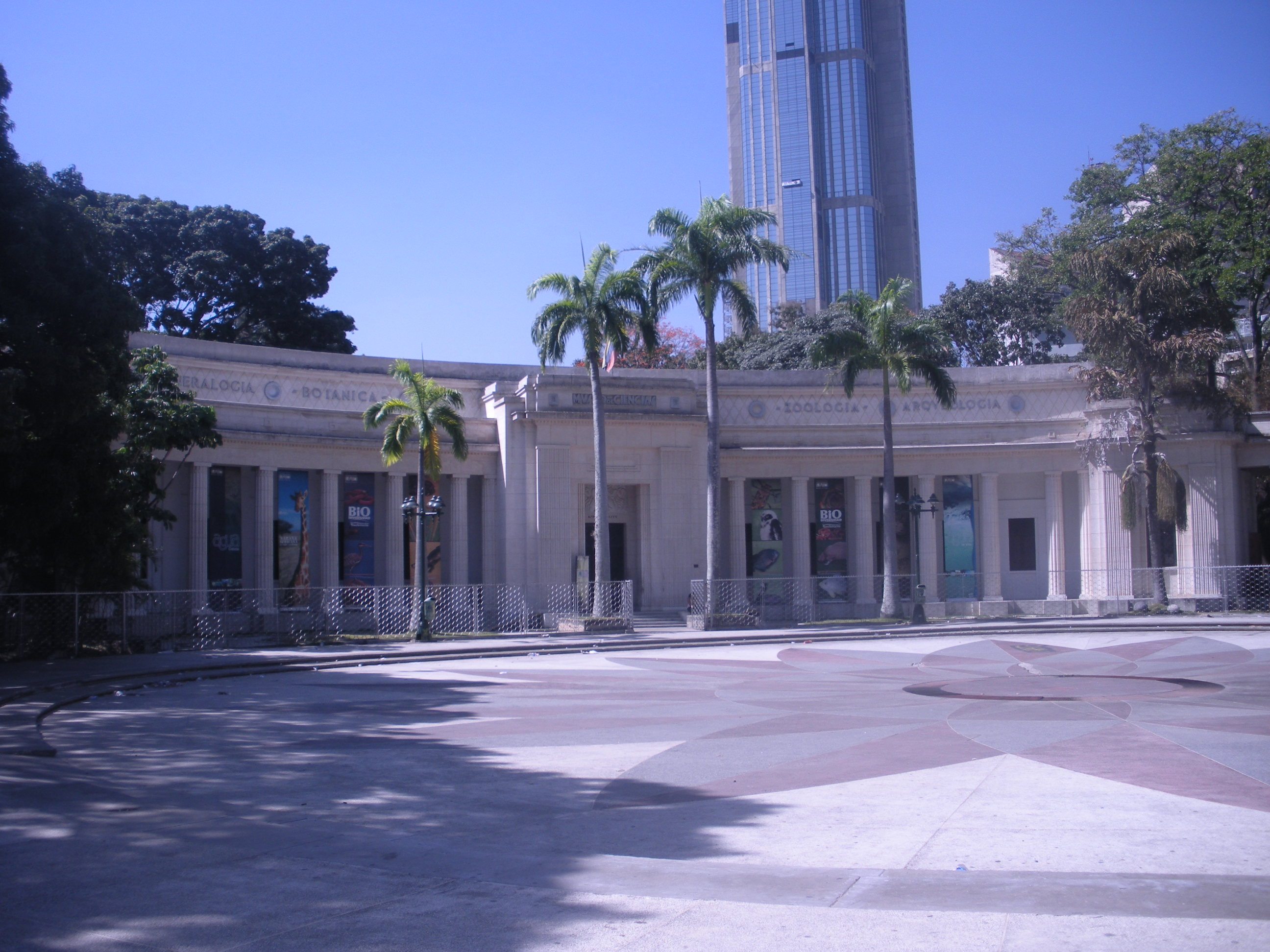 Museo de Ciencias de Caracas. Edificio diseñado por el arquitecto Carlos Raúl Villanueva, inaugurado en 1941. Construido entre 1939 y 1940.